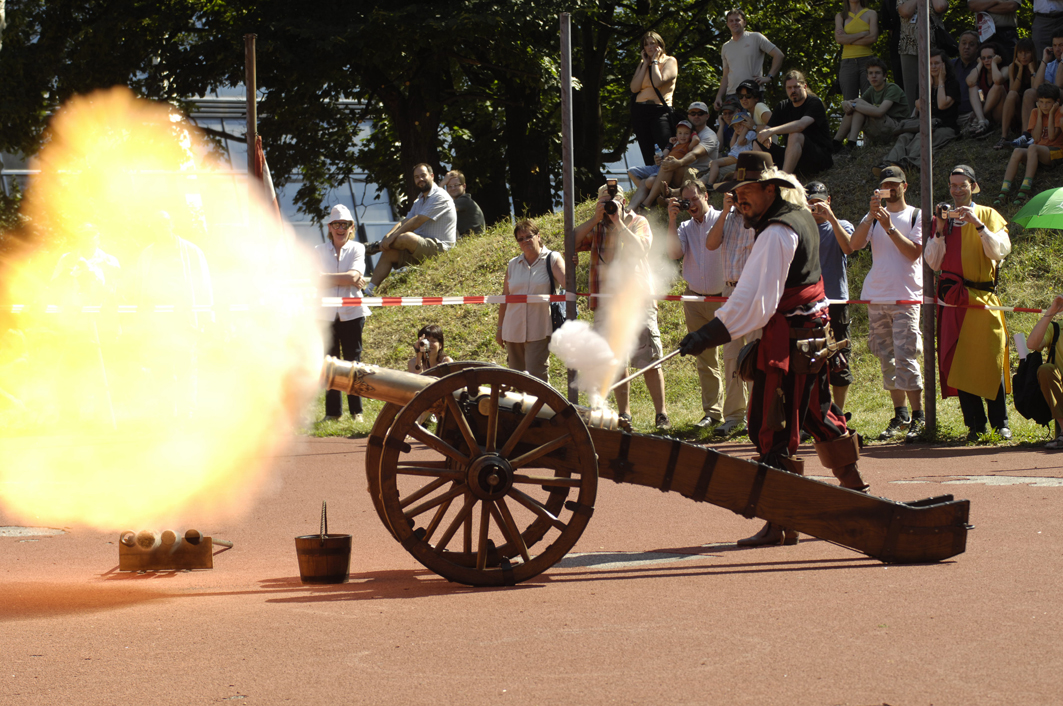 Foto von der Veranstaltung „Montur und Pulverdampf“ im Heeresgeschichtlichen Museum in Wien, Artillerievorführung